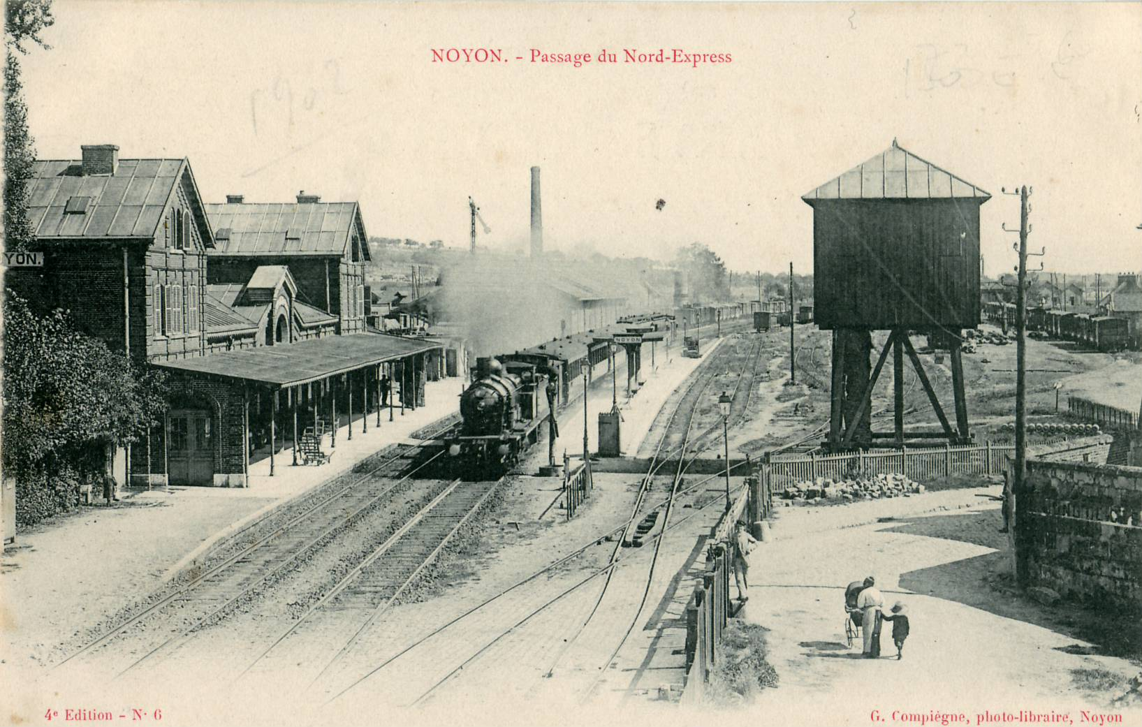 Carte postale ancienne éditée par G. Compiègne à Noyon - 4e édition N°6 NOYON : passage du Nord Express